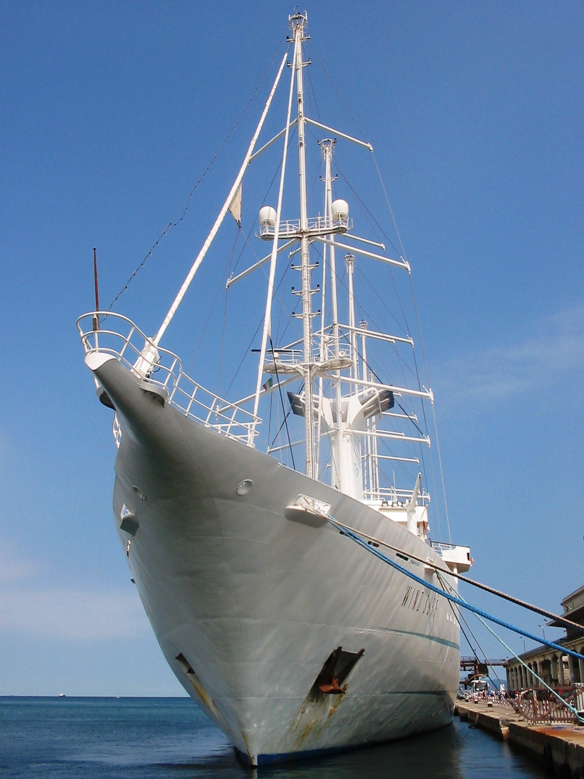 La nave da crociera "Wind Surf" ormeggiata alla Stazione Marittima di Trieste.